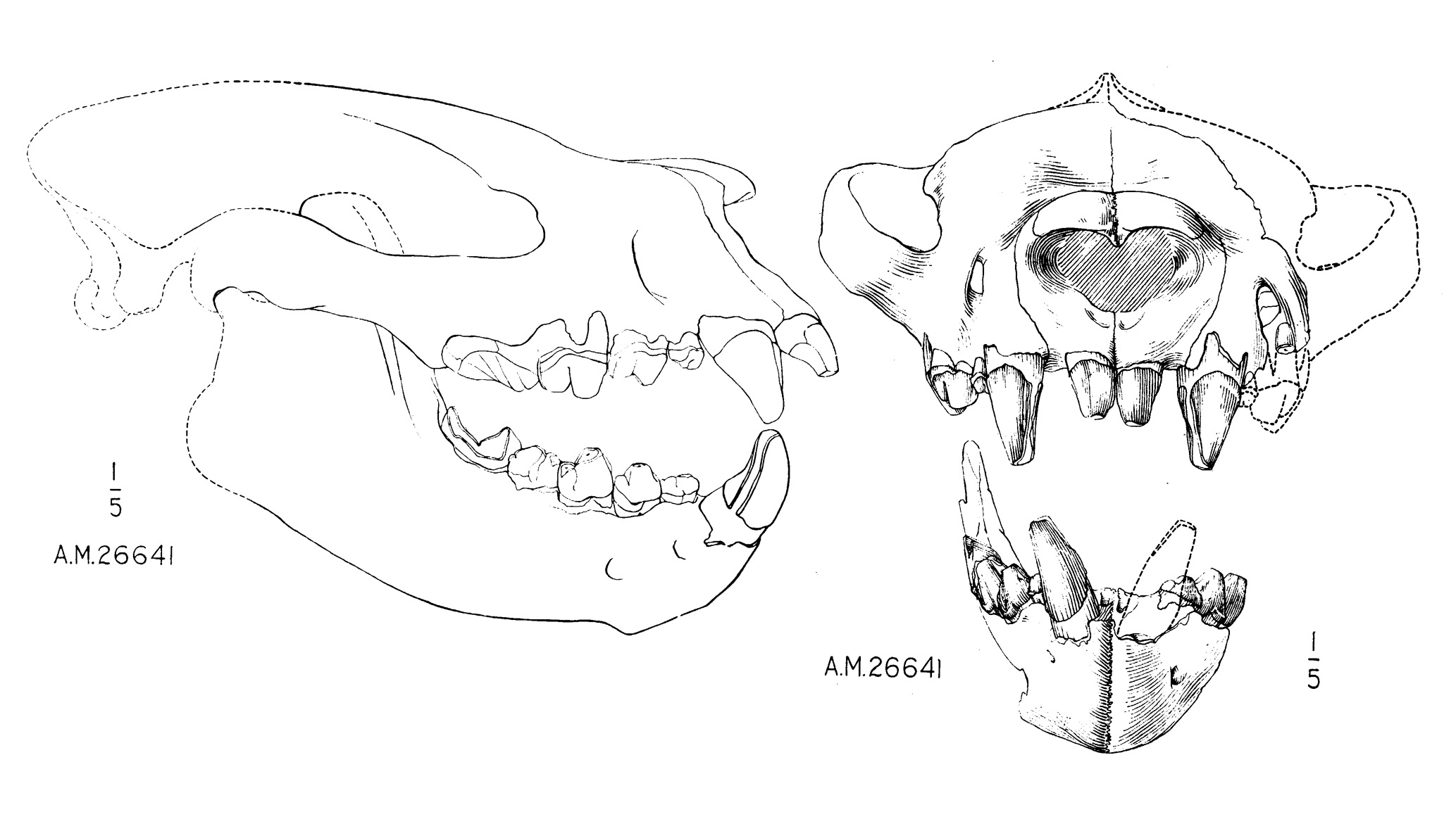 Skull of Sarkastodon mongolensis